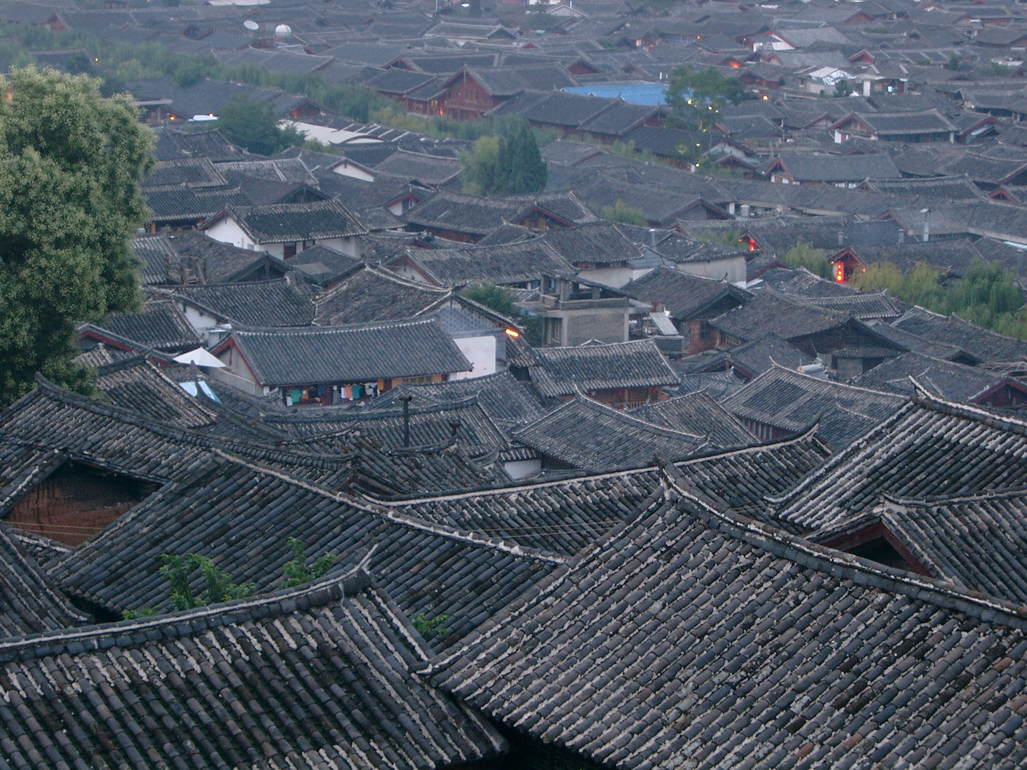 Die Dächer der Altstadt von Lijiang - UNESCO Weltkulturerbe